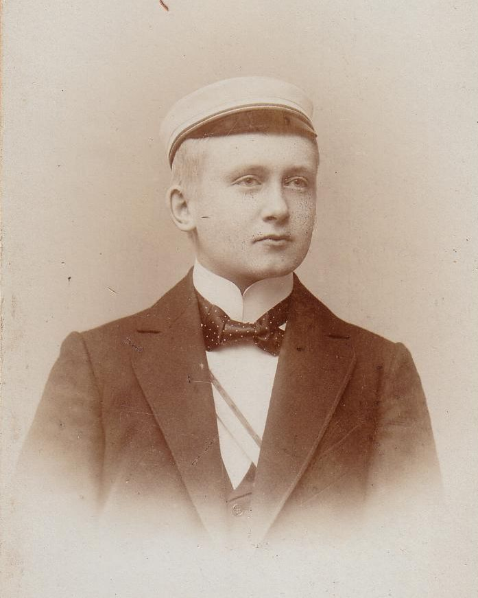 Porträtfotografie von Erich Haslinger (1882-1956) als aktiver Corpsstudent in Königsberg